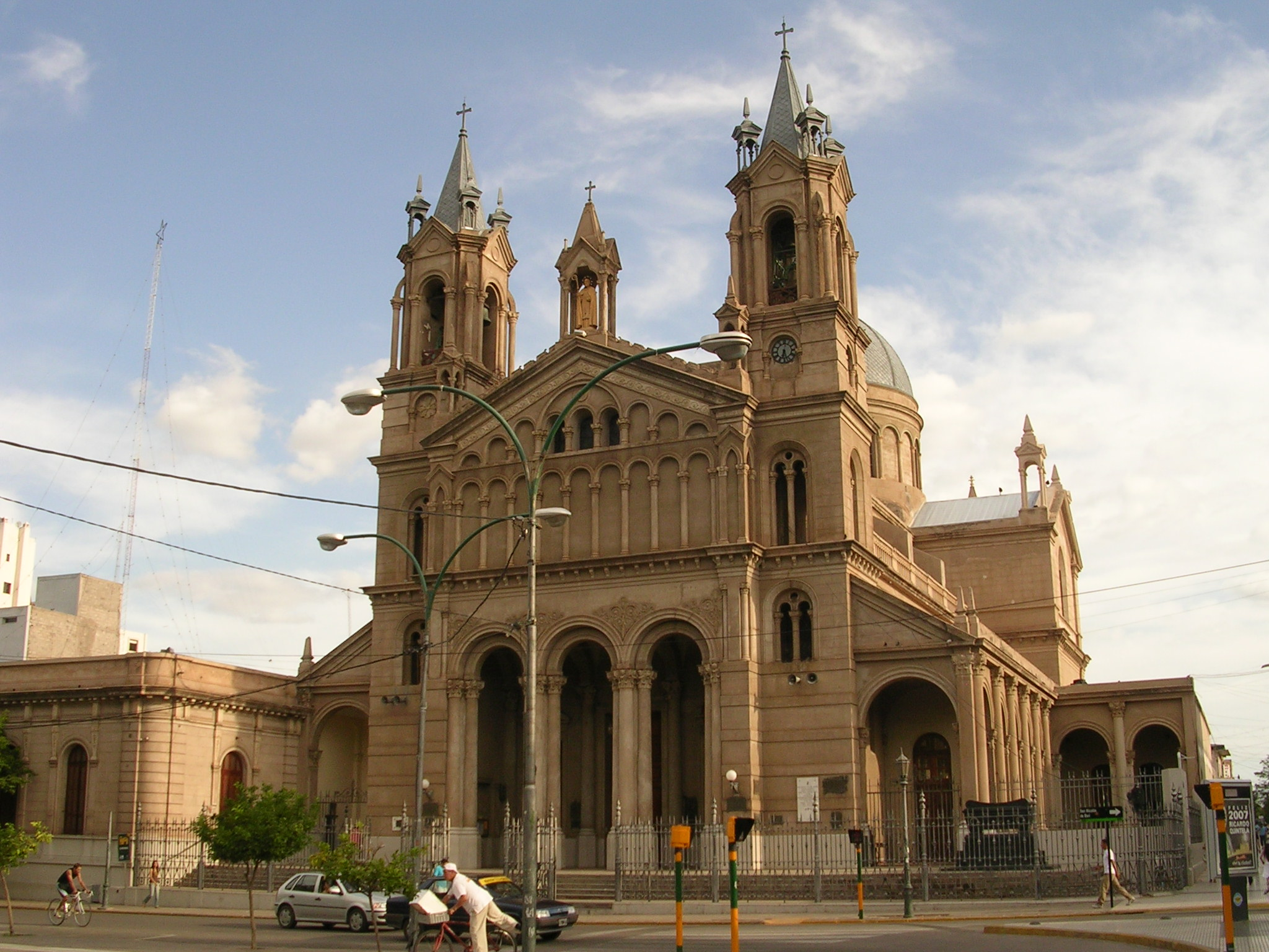 Catedral y Basilica de San Nicolas de La Rioja (Argentina)